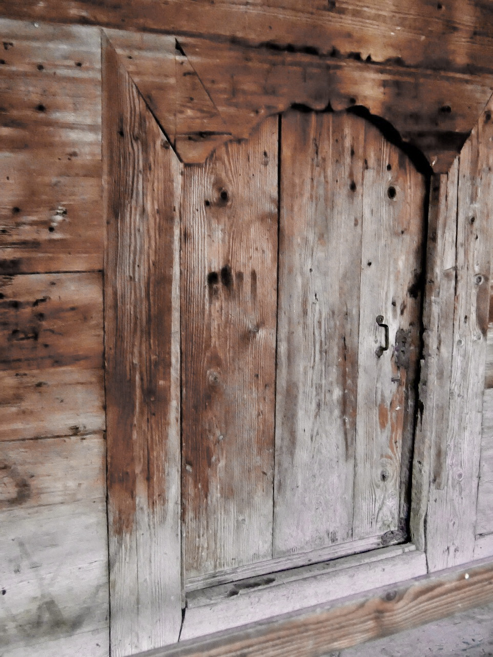 Steingaden, Ortsteil Urspring, Kirchenstr. 34: Eingang zum Getreidekasten